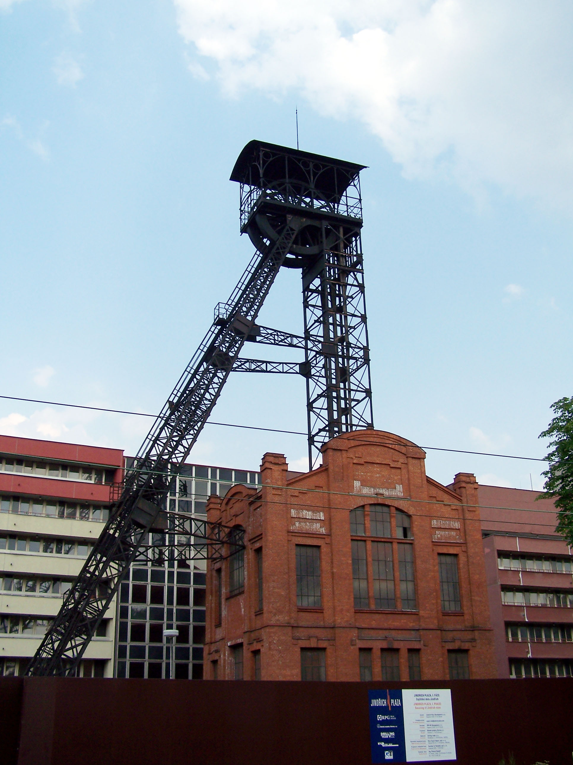 Jindřich Coal Mine in Ostrava, Czech Republic